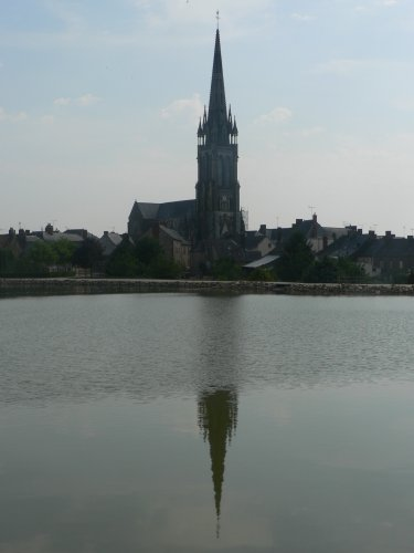 Clocher du Pertre + reflet dans l'étang du Pertre.